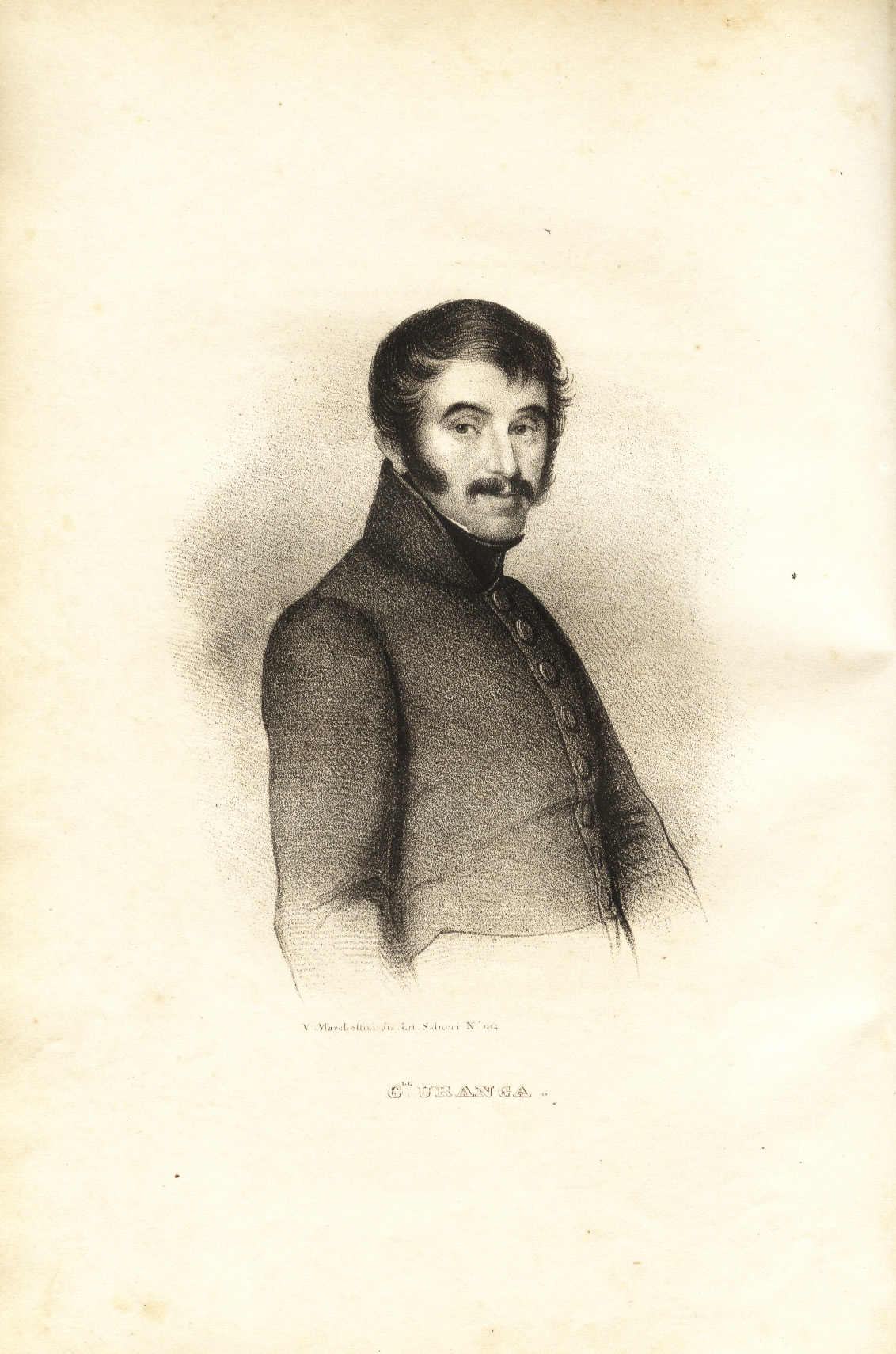 José Ignacio de Uranga. Dibujo de Isidoro Magués. "Don Carlos e i suoi difensori". Firenze 1837